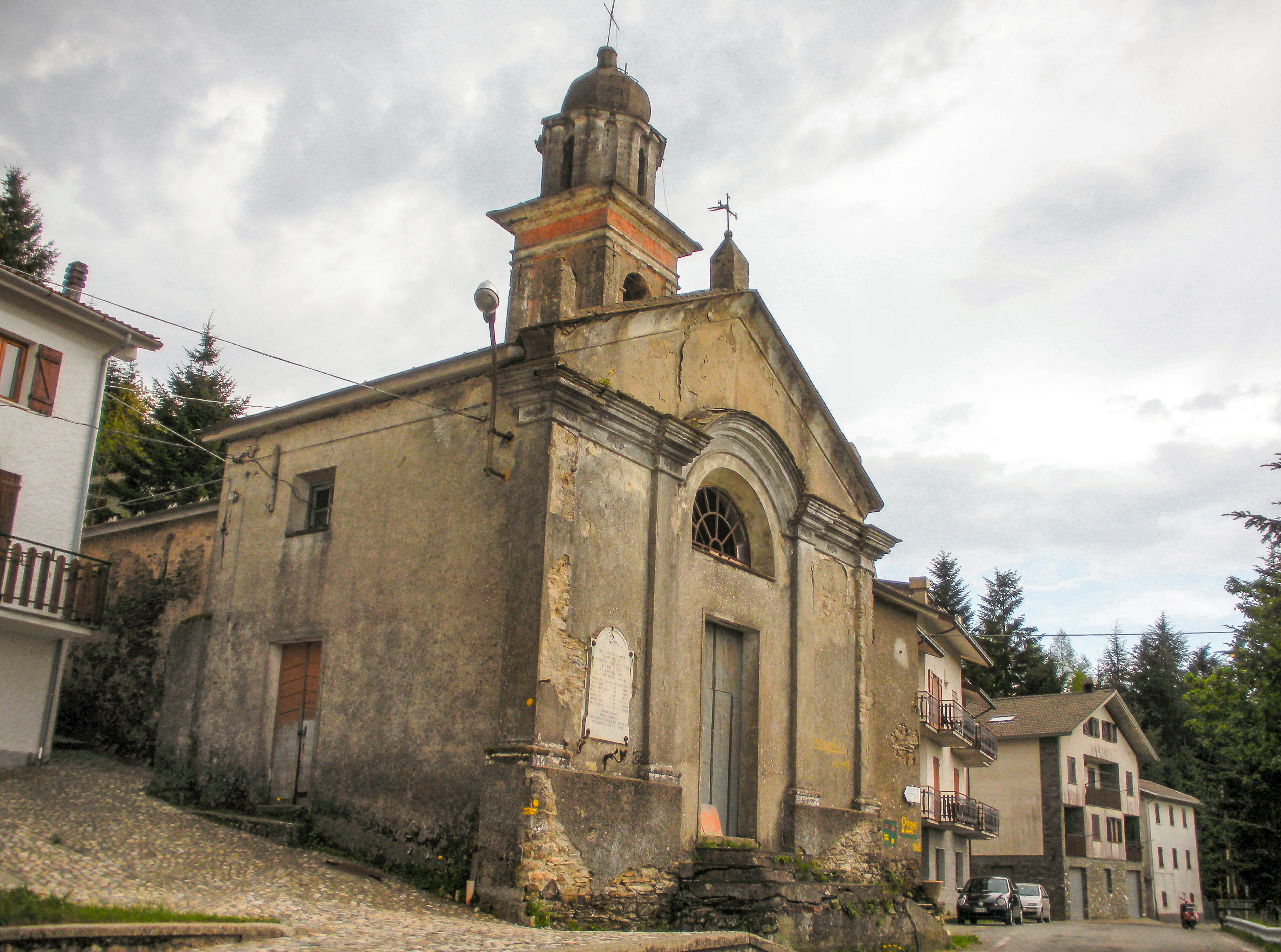 Barbagelata (comune di Lorsica, prov. Genova), la vecchia chiesa Foto propria Maggio 2010